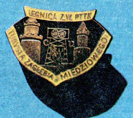 Odznaka PTTK Turysta Zagłębia Miedziowego w stopniu srebrnym (z żółtą emalią).